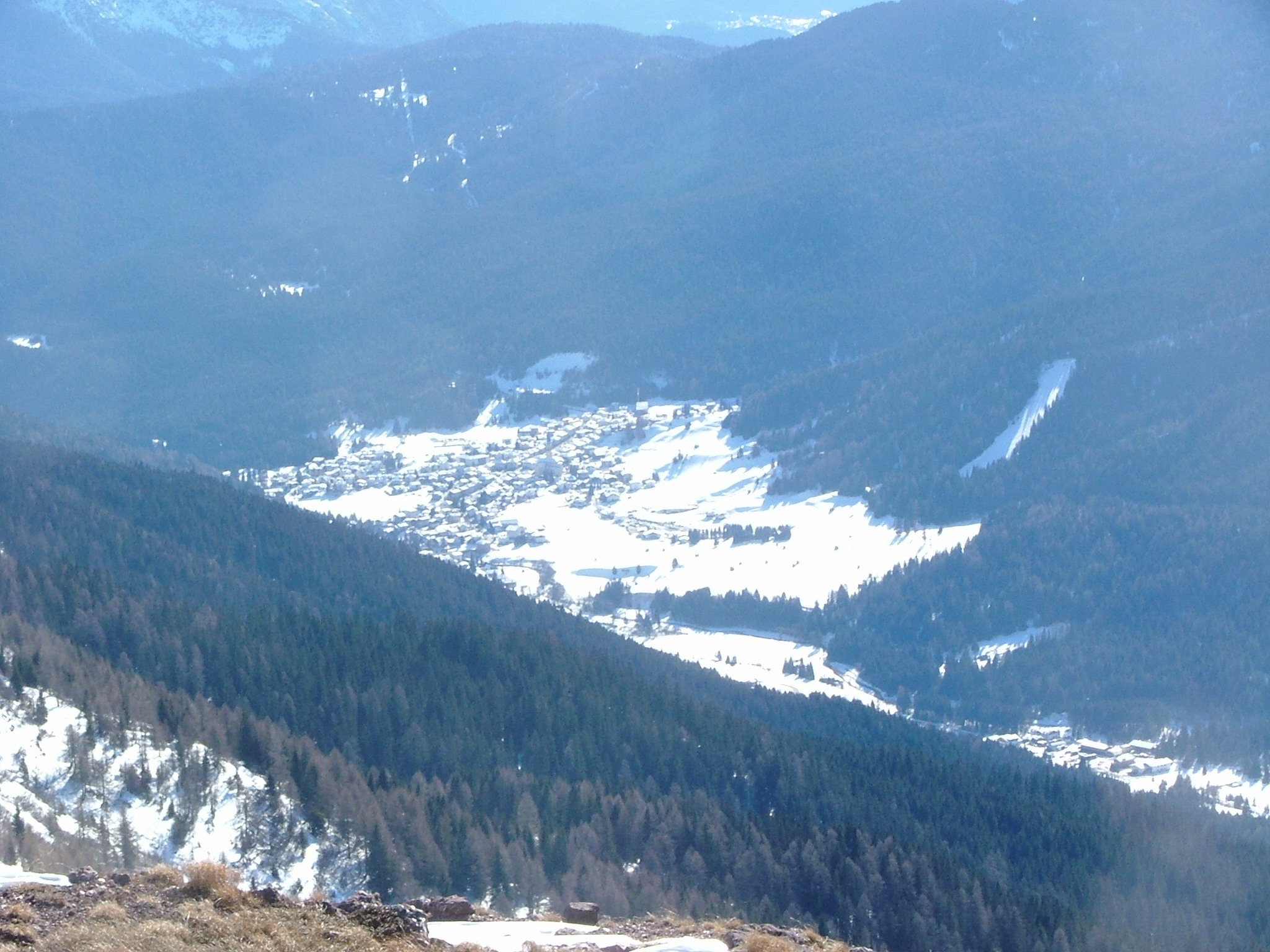 Padola,Comelico Superiore, Belluno, Dolomites, Veneto, Italy